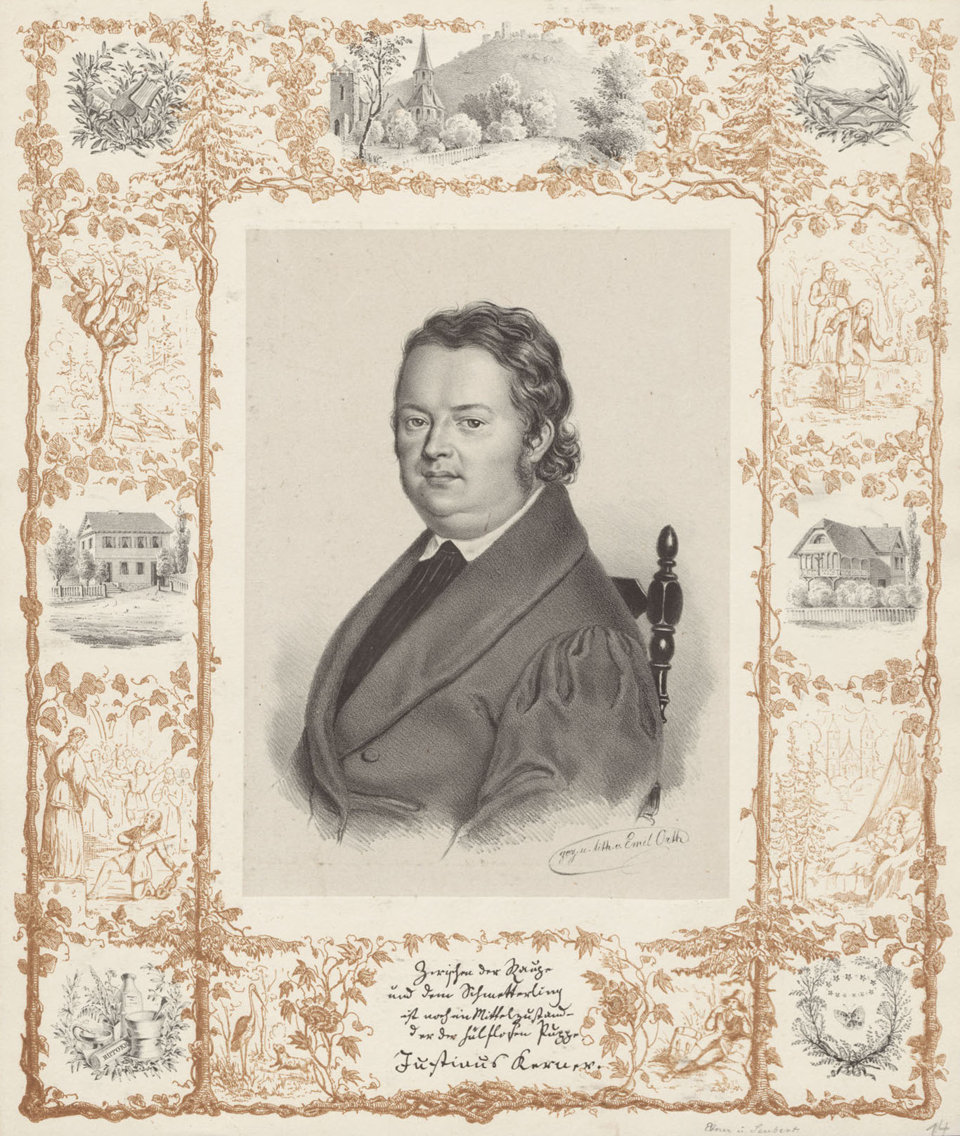 Justinus Kerner (1786–1862). Lithographie